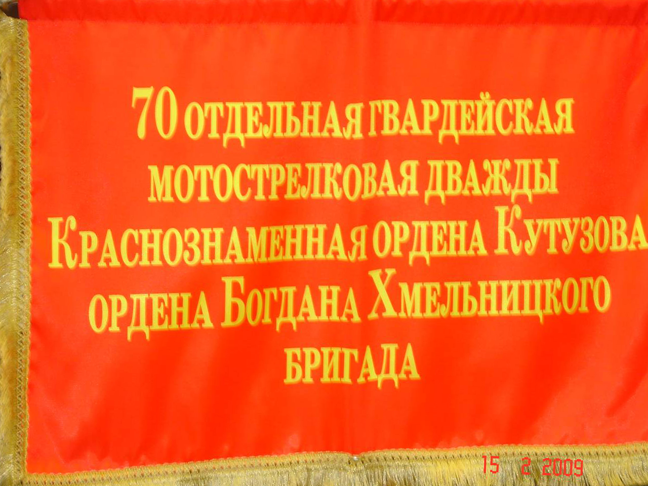 70-я гвардейская Отдельная мотострелковая бригада